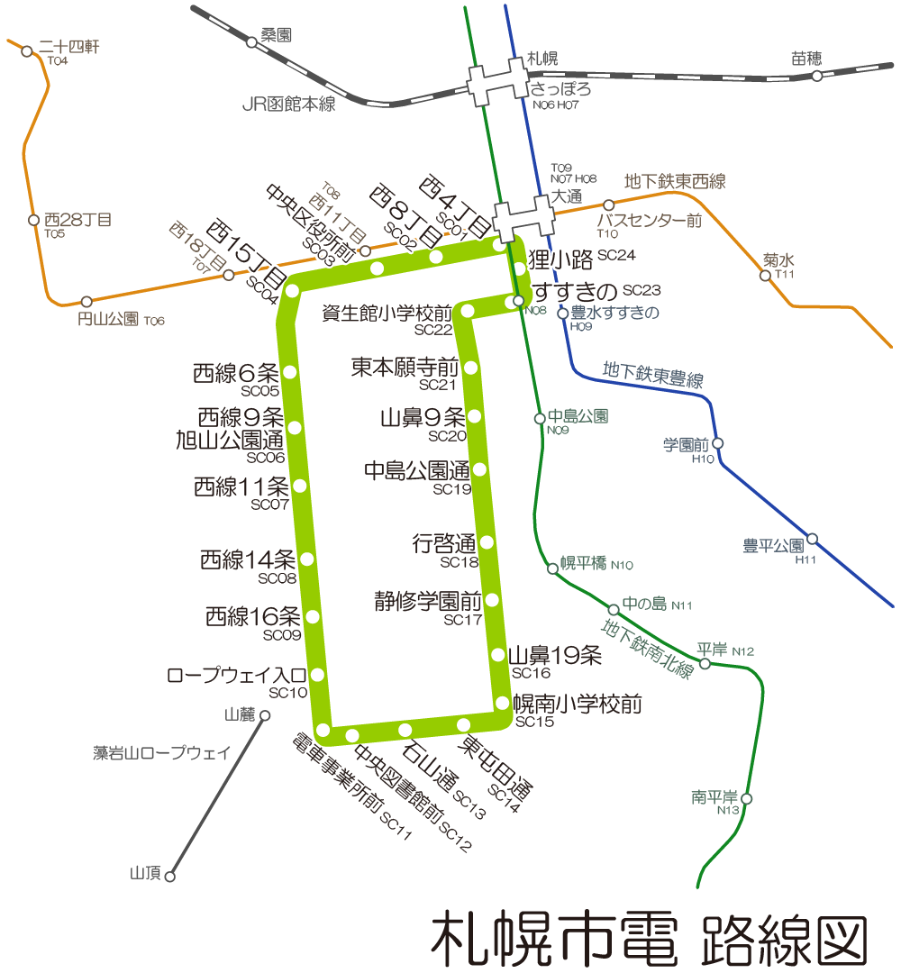 札幌市電の路線図